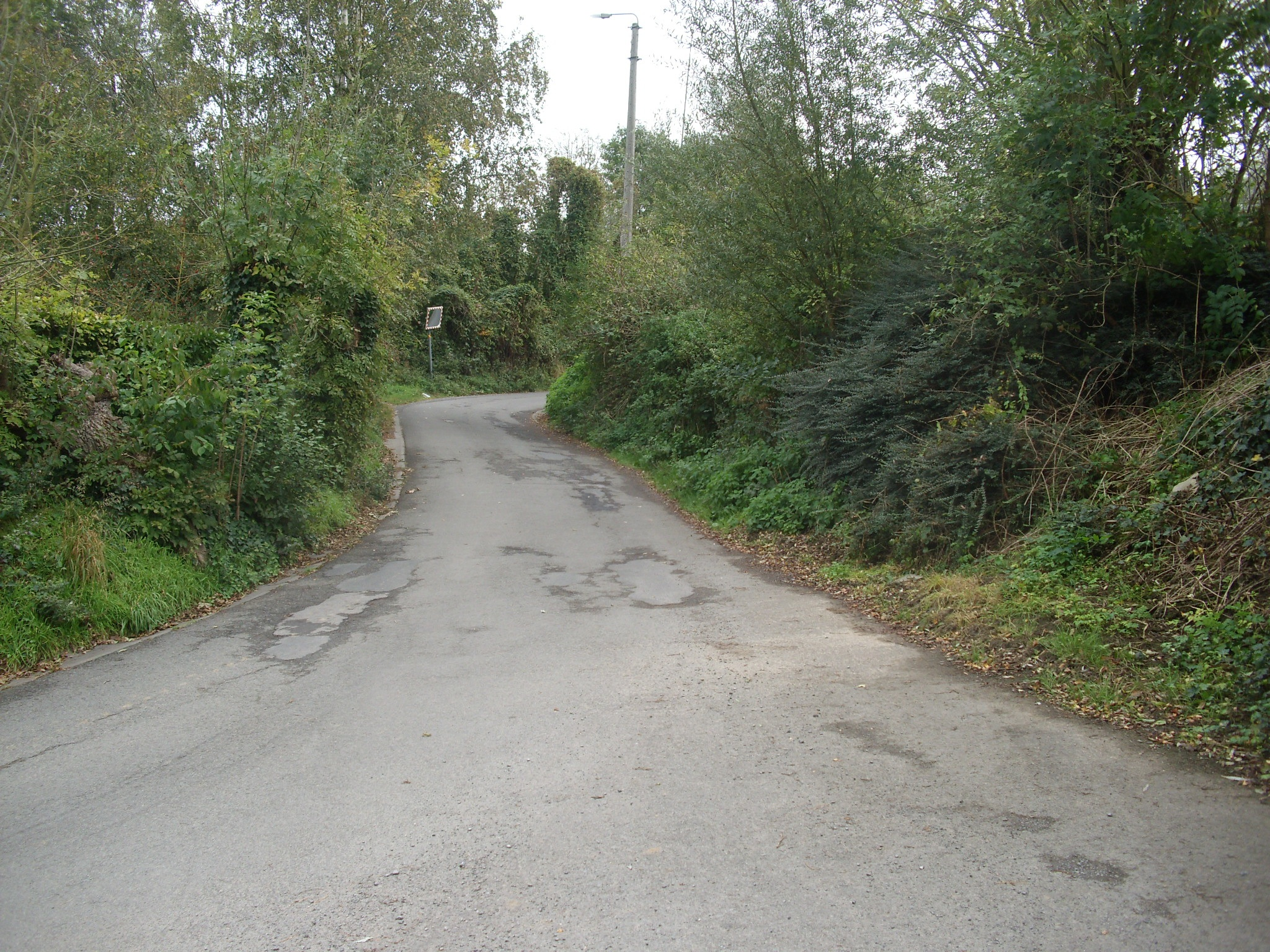 De helling Kortekeer - Maarkedal - Oost-Vlaanderen - België